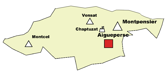 Comté de Montpensier. Principauté médiévale du nord de l'Auvergne.